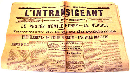 jornal "O intransigente" 1894 sobre a execução de Émile Henry.